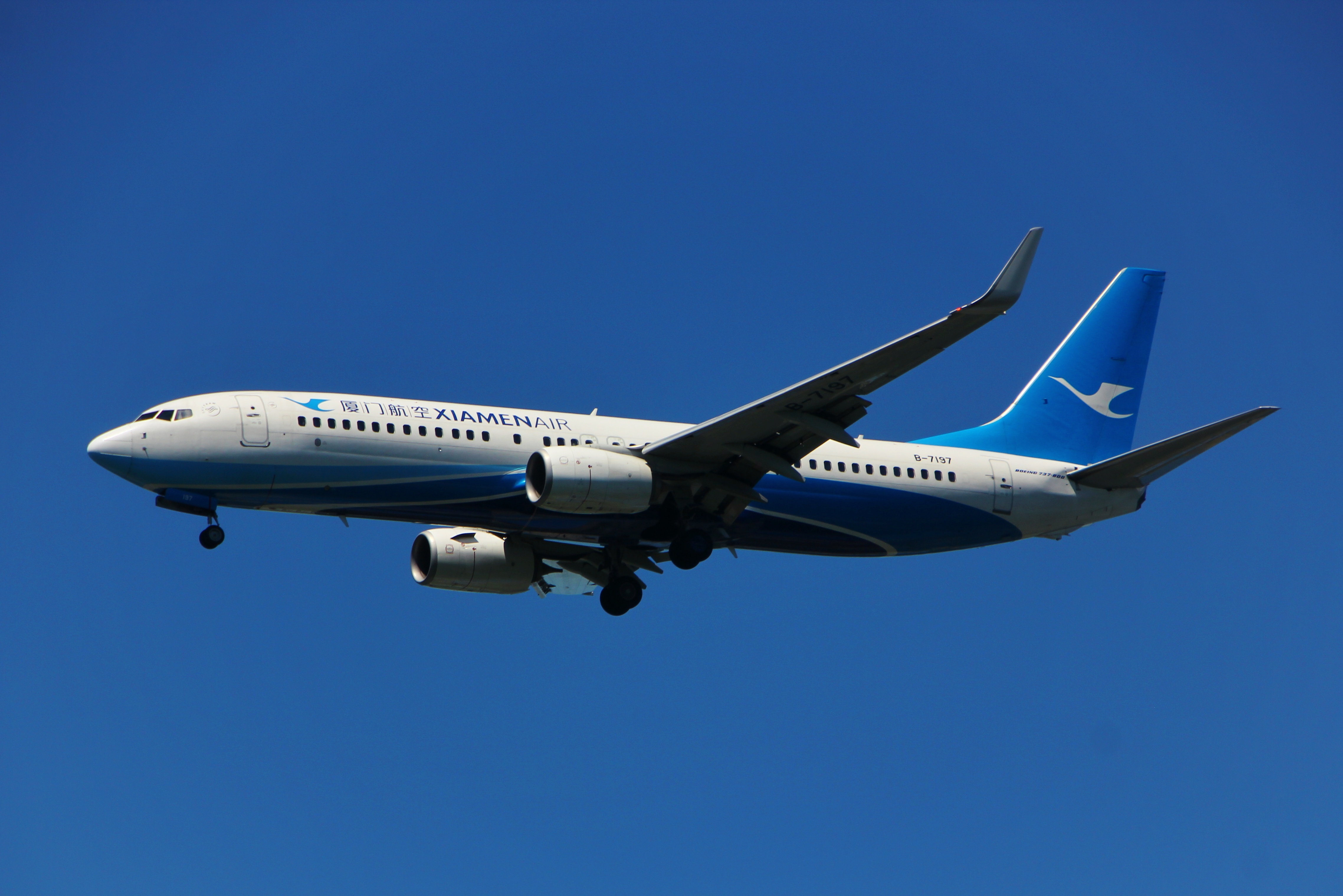 中文（中国大陆）: 厦门航空B737-800(B-7197)在哈尔滨太平机场